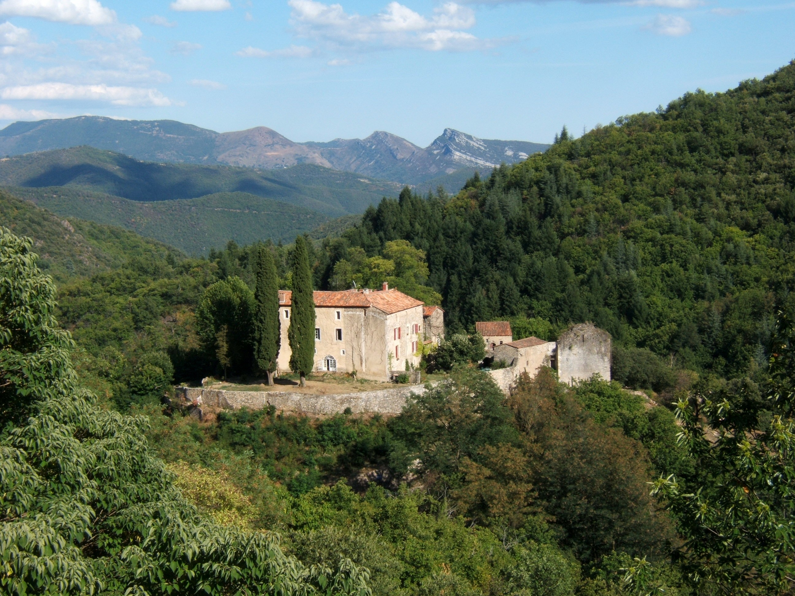 Vue sur le château de Mandagout avec, en arrière plan, les Jumeaux de Sumêne.